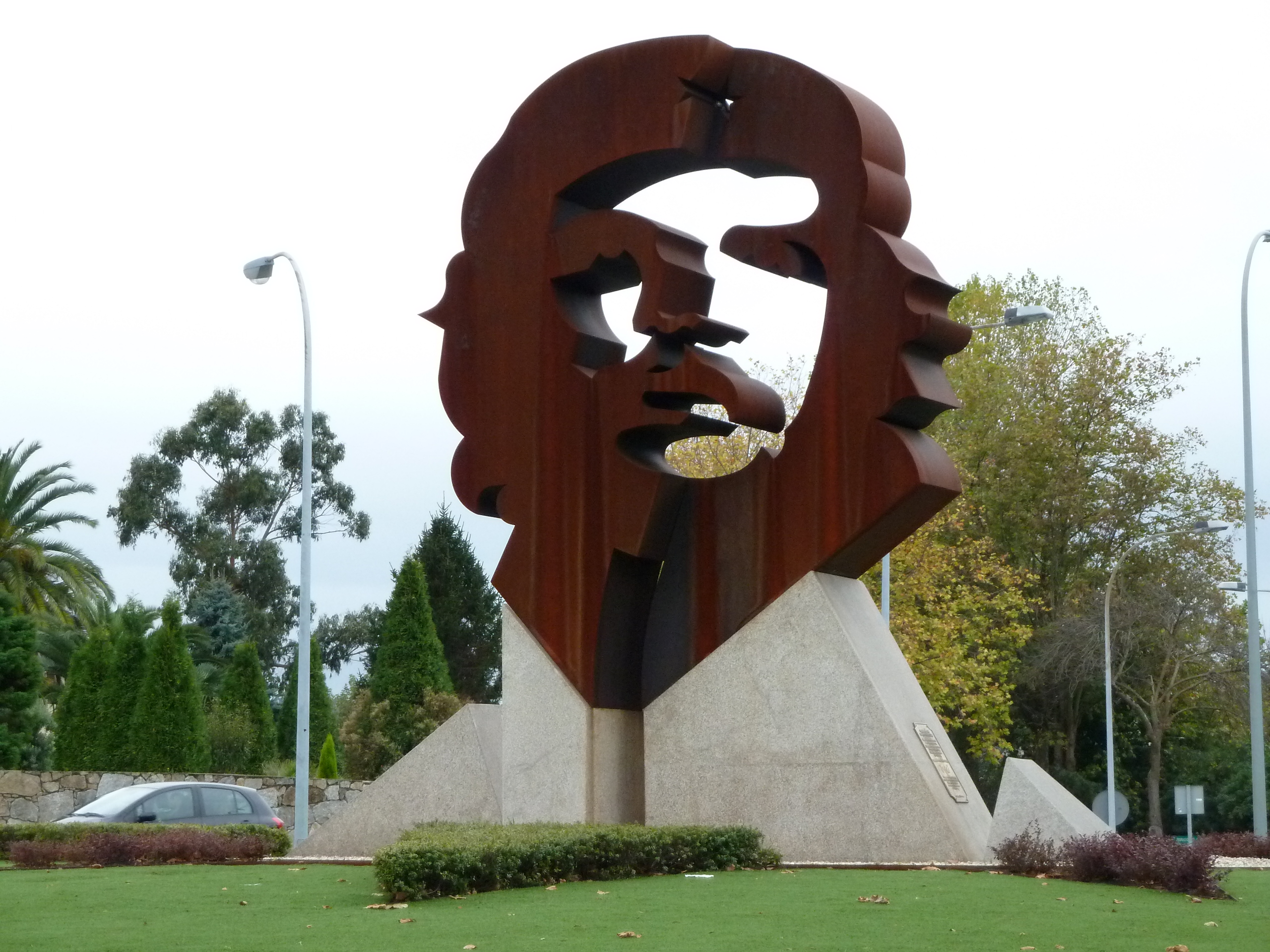 Estatua do Che Guevara no concello de Oleiros, Coruña, España.